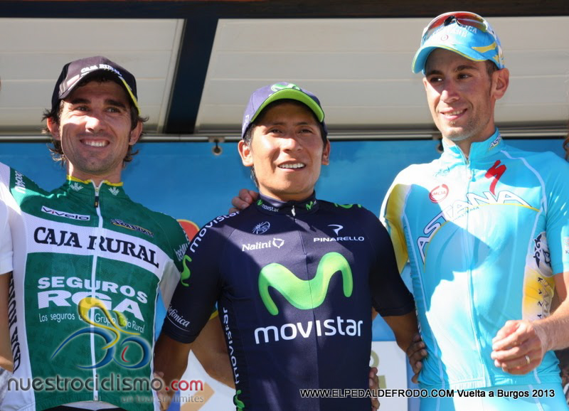 Podio de la Vuelta a Burgos 2013. Nairo Quintana, David Arroyo y Vincenzo Nibali